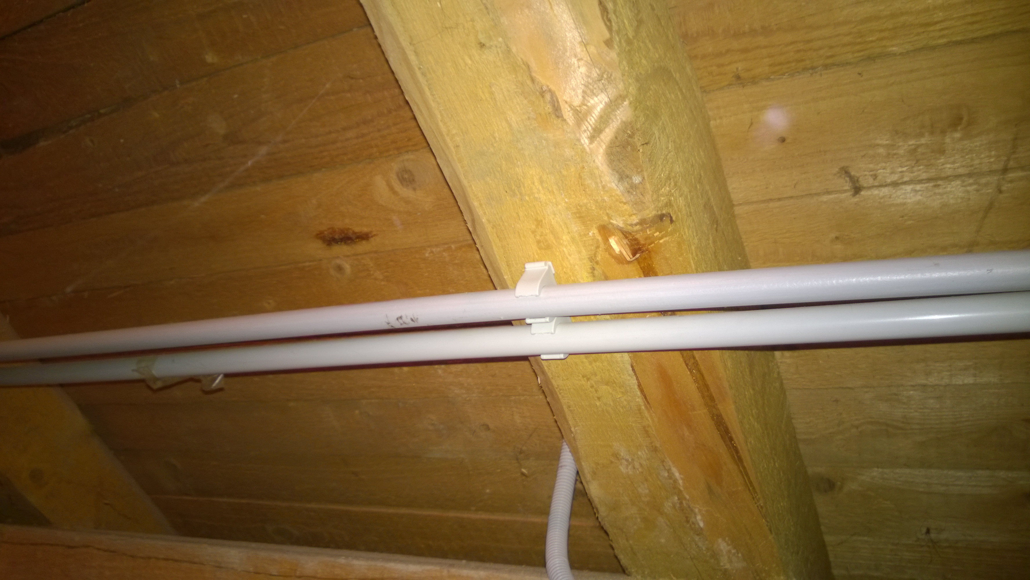 Inštalacija pritrjena na les.